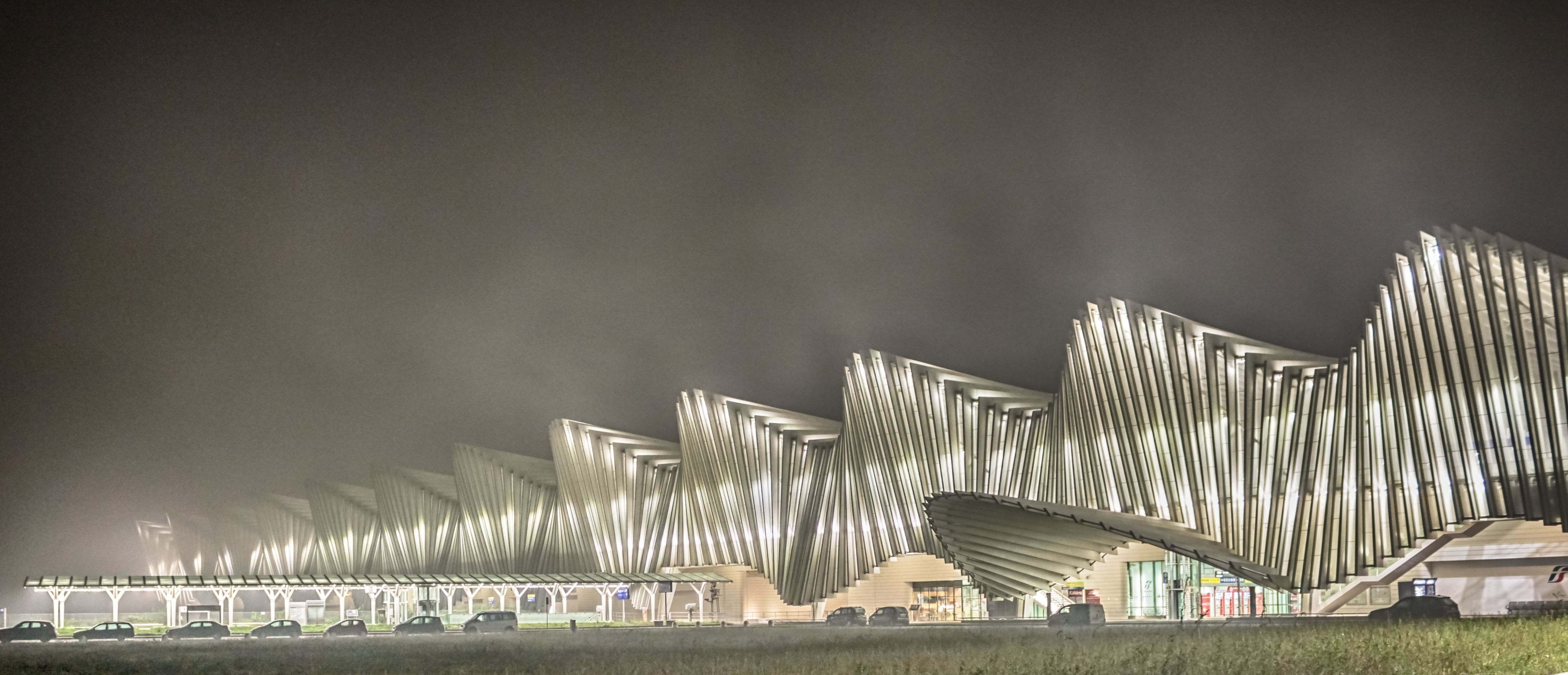 Stazione Mediopadana alta velocità di Reggio Emilia